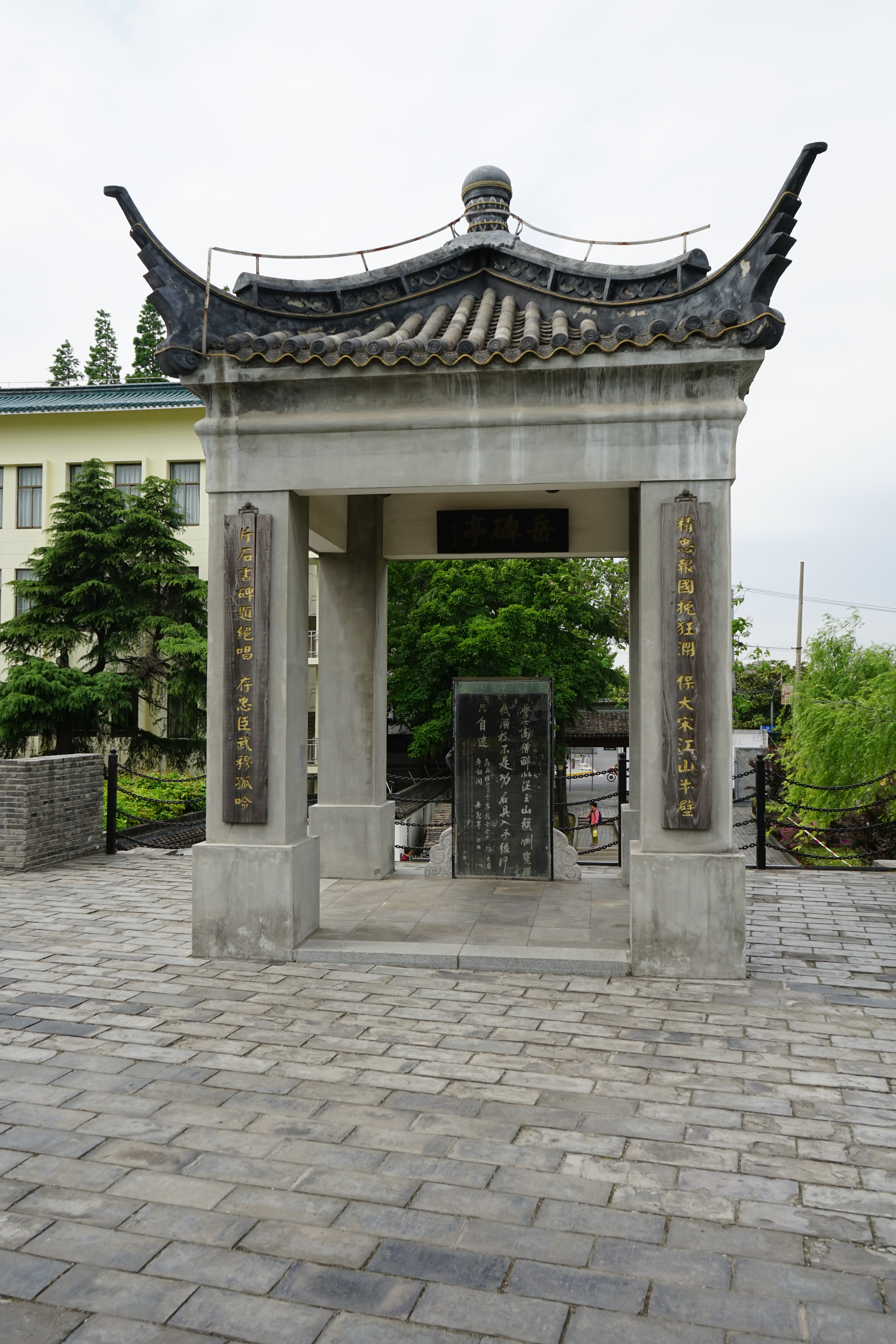 中文（中国大陆）: 岳碑亭。浦东新区文物保护单位。位于川沙古城墙公园内。